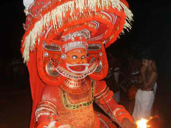 പൊയ്ക്കണ്ണണിഞ്ഞ വയനാട്ടു കുലവൻ തെയ്യം